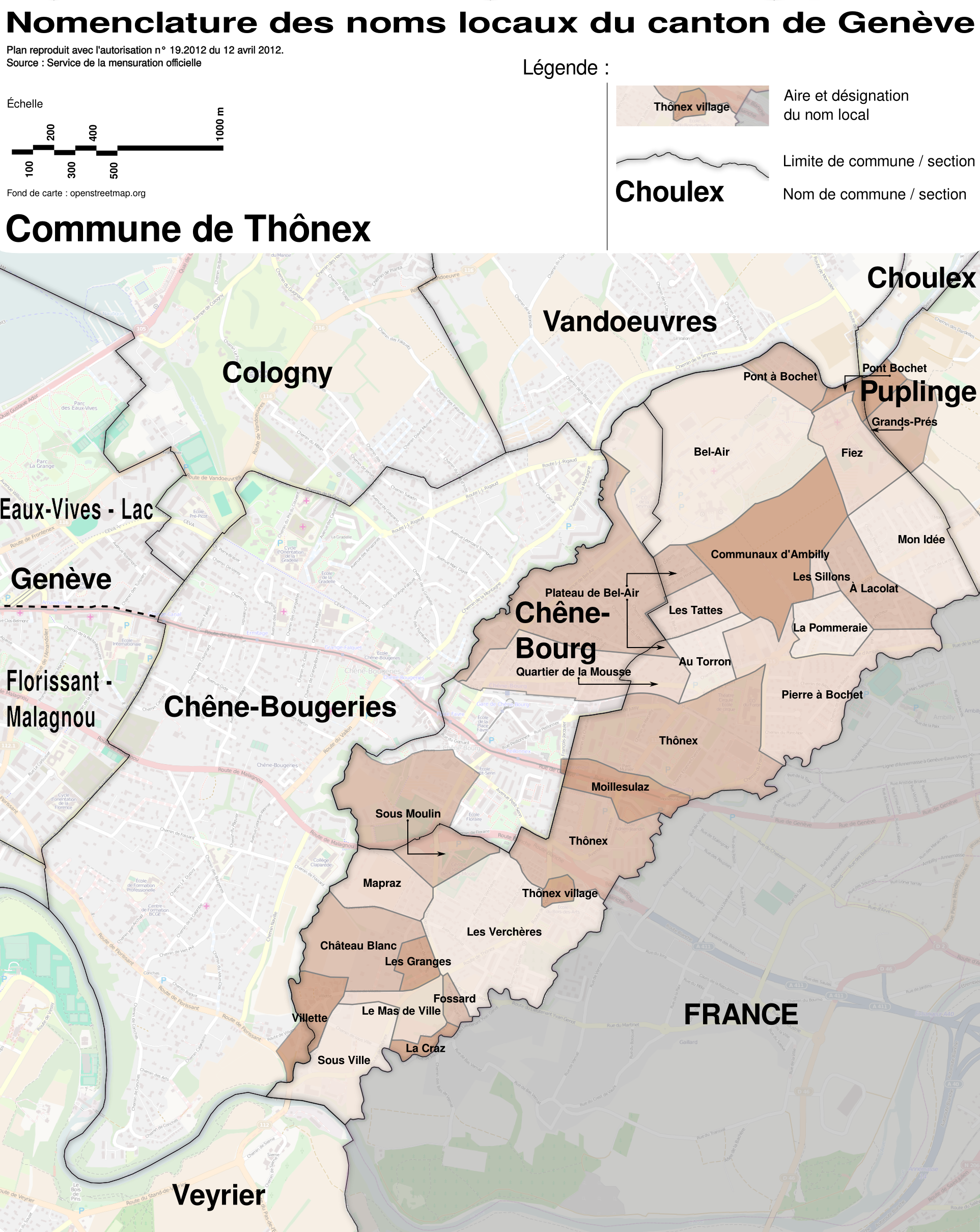 Nomenclature des noms locaux du canton de Genève, généralement appelés "Lieux-dit". Cette nomenclature a été recueillie entre 1932 et 1953 lors de la création du Plan d'Ensemble (PE) du canton de Genève. Plan reproduit avec l'autorisation n° 19.2012 du 12 avril 2012. Source : Service de la mensuration officielle. Noms locaux sur la commune de Thônex.